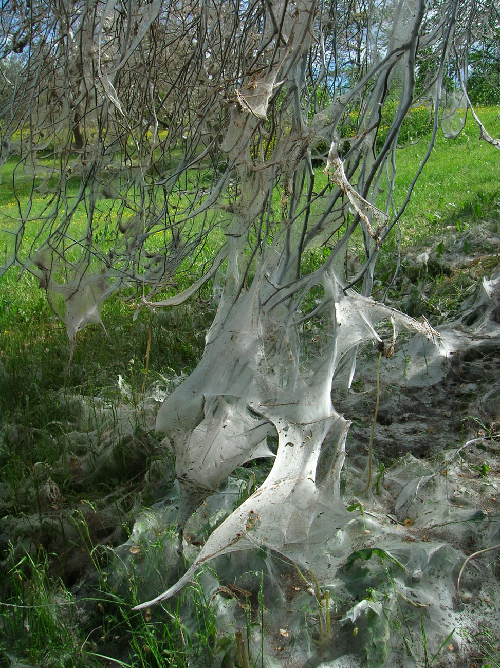 Tuomenkehrääjäkoin kutomaa seittiä tuomessa.